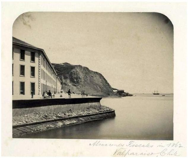 Fotos históricas de Valparaíso en Chile